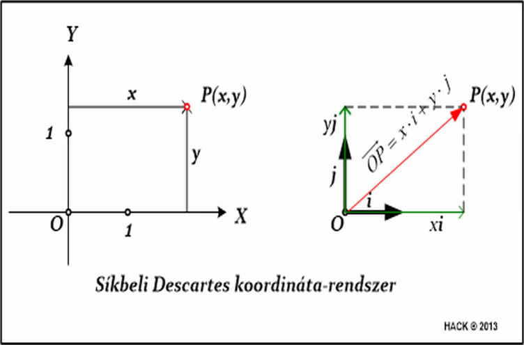 Derékszögű koordináták síkban